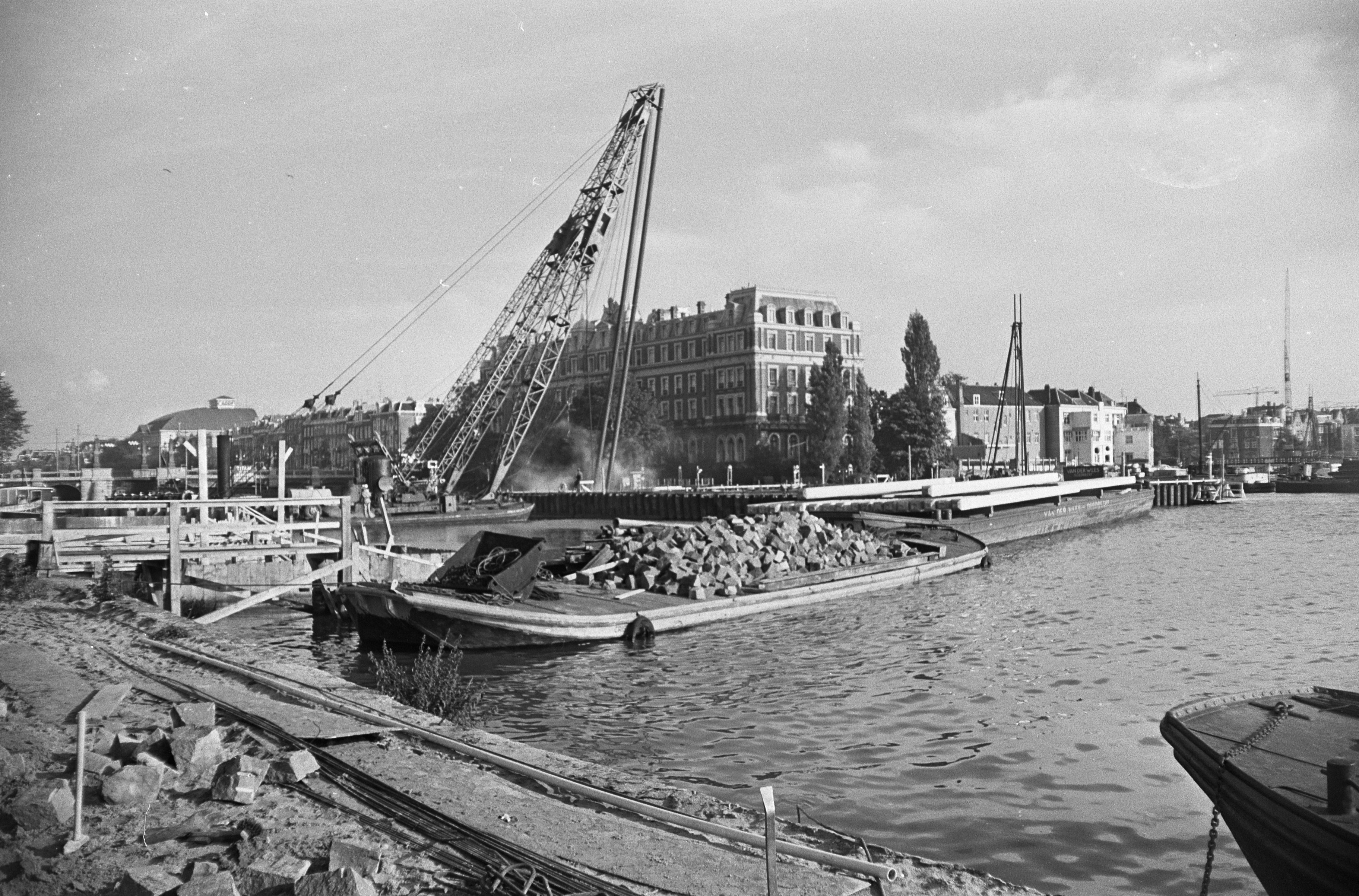 Collectie / Archief : Fotocollectie Anefo Reportage / Serie : [ onbekend ] Beschrijving : Nieuwe brug over de Amstel "de Stadhoudersbrug" , de bouwput, met achtergrond Amstel hotel Datum : 3 oktober 1967 Trefwoorden : bruggen Persoonsnaam : Amstel Instellingsnaam : Amstel Hotel Fotograaf : Merk, Ben / Anefo Auteursrechthebbende : Nationaal Archief Materiaalsoort : Negatief (zwart/wit) Nummer archiefinventaris : bekijk toegang 2.24.01.05 Bestanddeelnummer : 920-7534 Reacties Geplaatst door Maaike op 21 mei 2014 - 21:41. Op 2 oktober 1974 is de naam van de brug gewijzigd in Torontobrug. NB. Toronto is de 'zusterstad' van Amsterdam